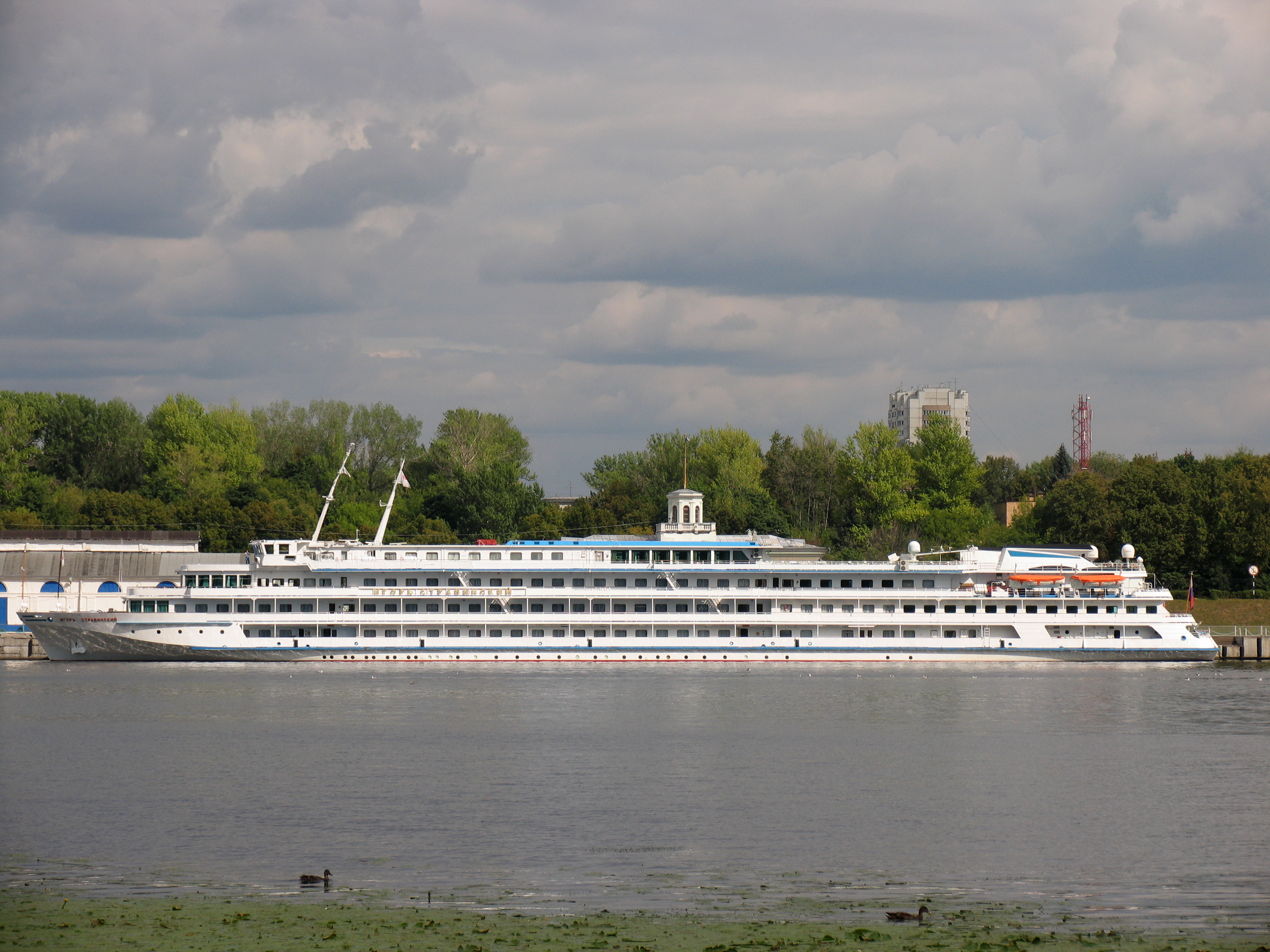 Речное круизное судно "Игорь Стравинский" в Северном речном порту, Москва.